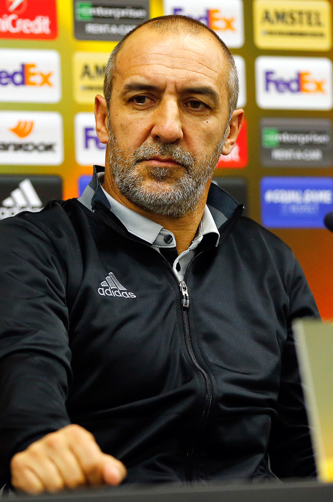 Пресс-конференция и тренировка «Шерифа» перед матчем с «Локомотивом»